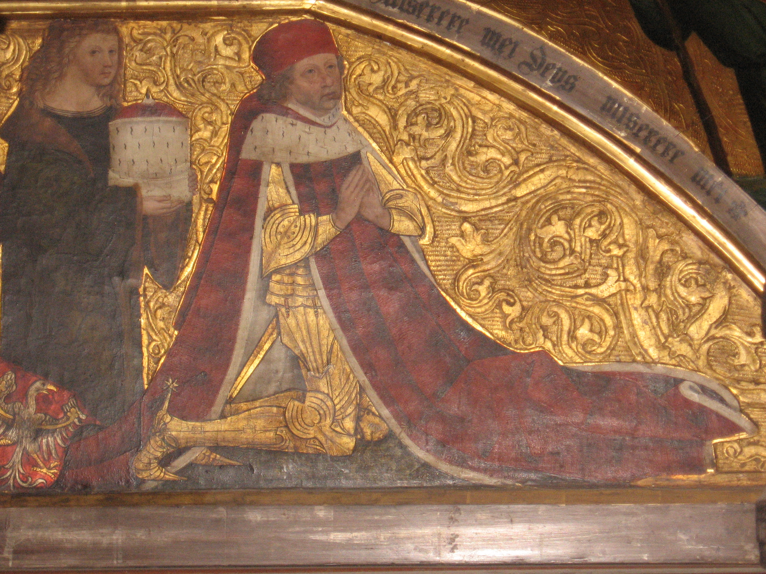 Darstellung des Albrecht Achilles auf der Predella des von ihm gestifteten Schwanenordensaltars (1484) in St. Gumbertus (Detail).